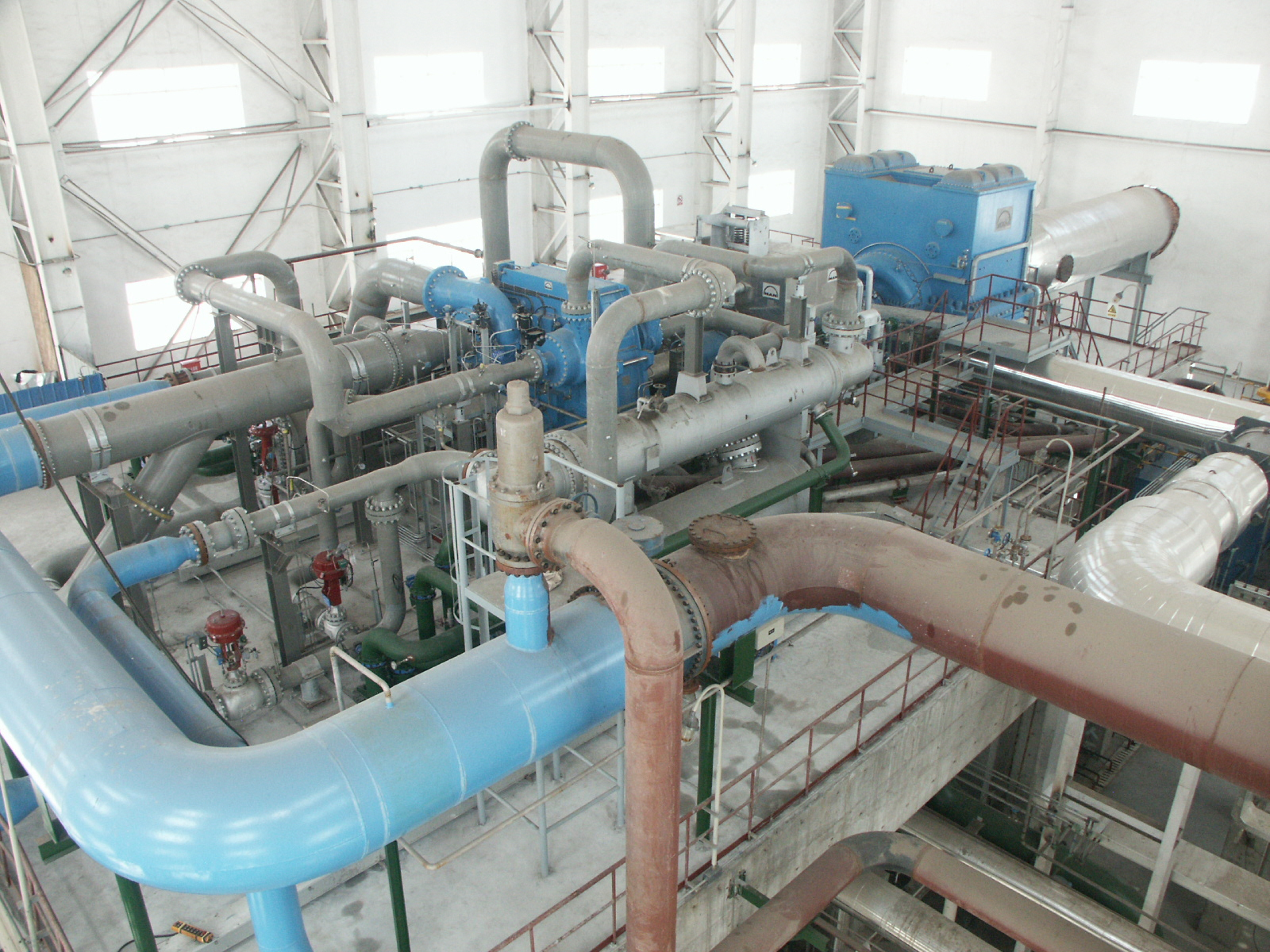 Kompressorstrang einer Luftzerlegungsanlage